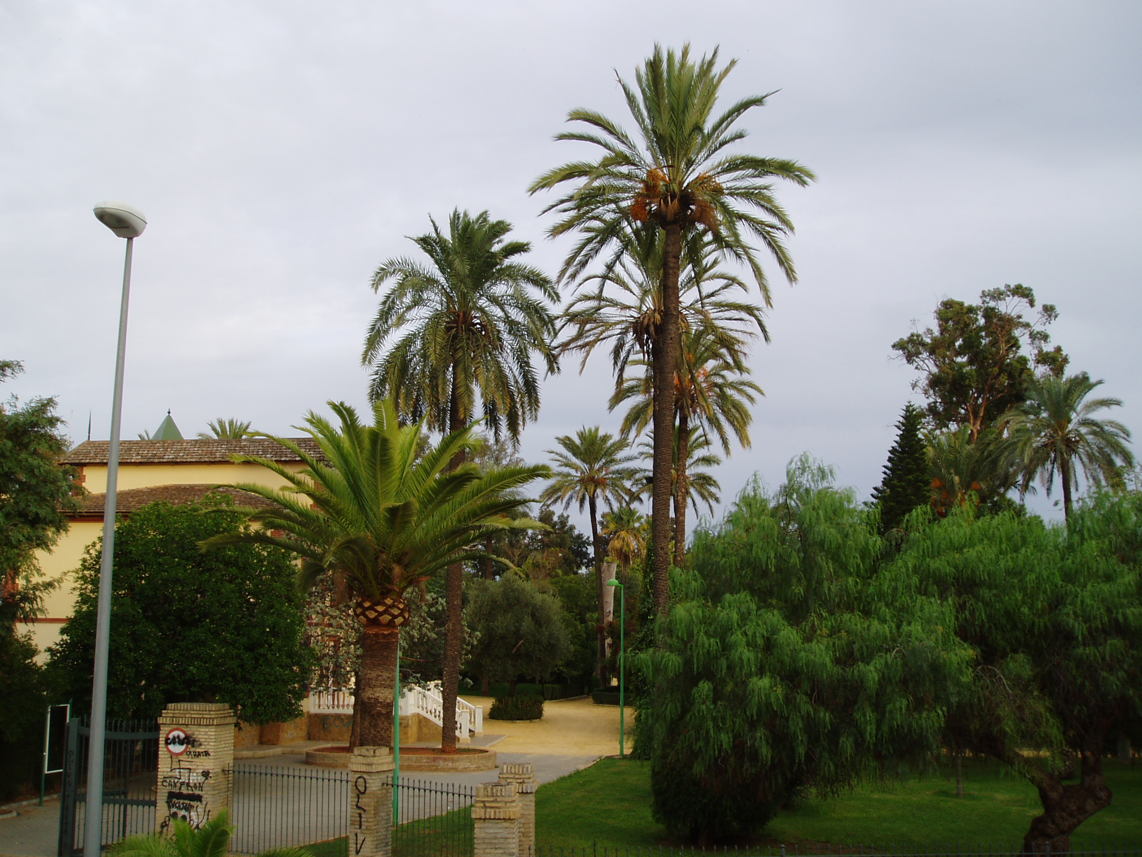 Parque de la Alquería, Dos Hermanas (sevilla-españa)